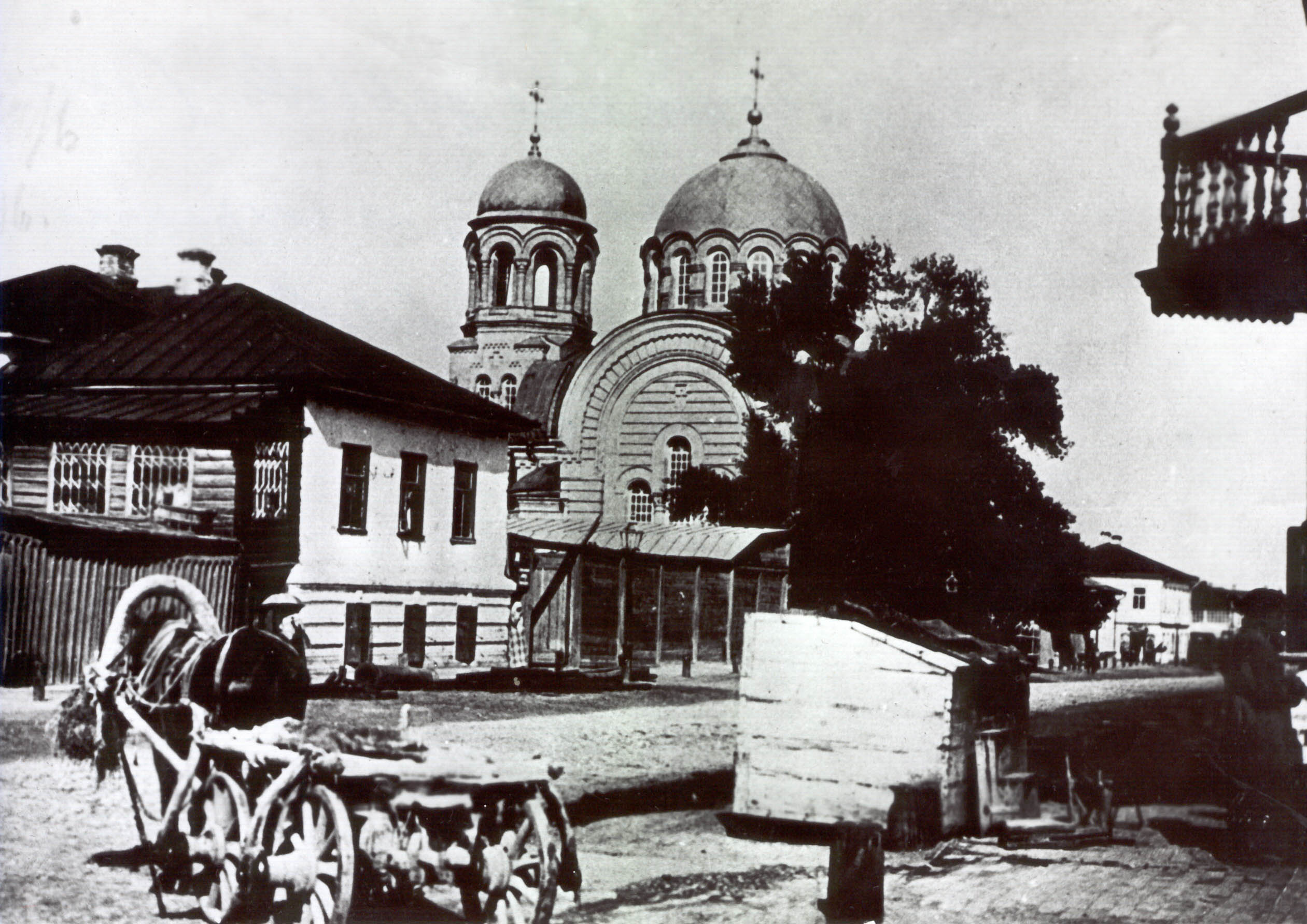 Киево-Подольская Введенская церковь. Фото начала ХХ века